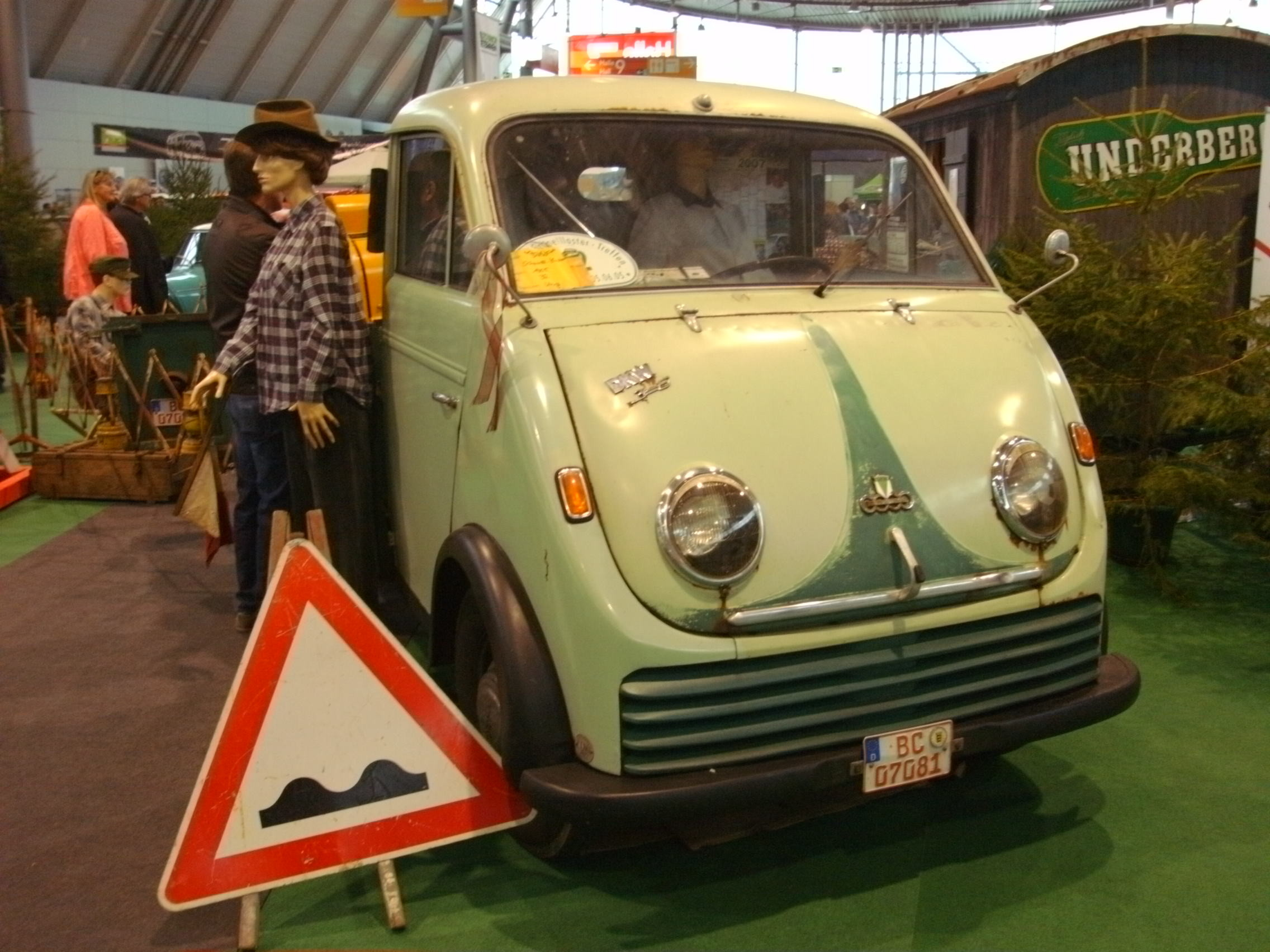 DKW Schnell-Laster auf Retro Classics Stuttgart 2014